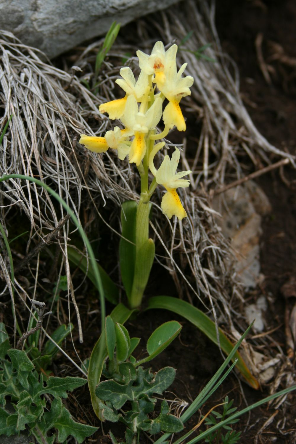 Orchis pauciflora, Orchideen (Orchidaceae) - Italien/Italia/Italy: Basilicata, Prov. Potenza, Parco Nazionale del Pollino, Massiccio del Pollino, SE-Fuß des Bergs Timpone della Capanna, ober "Belvedere"